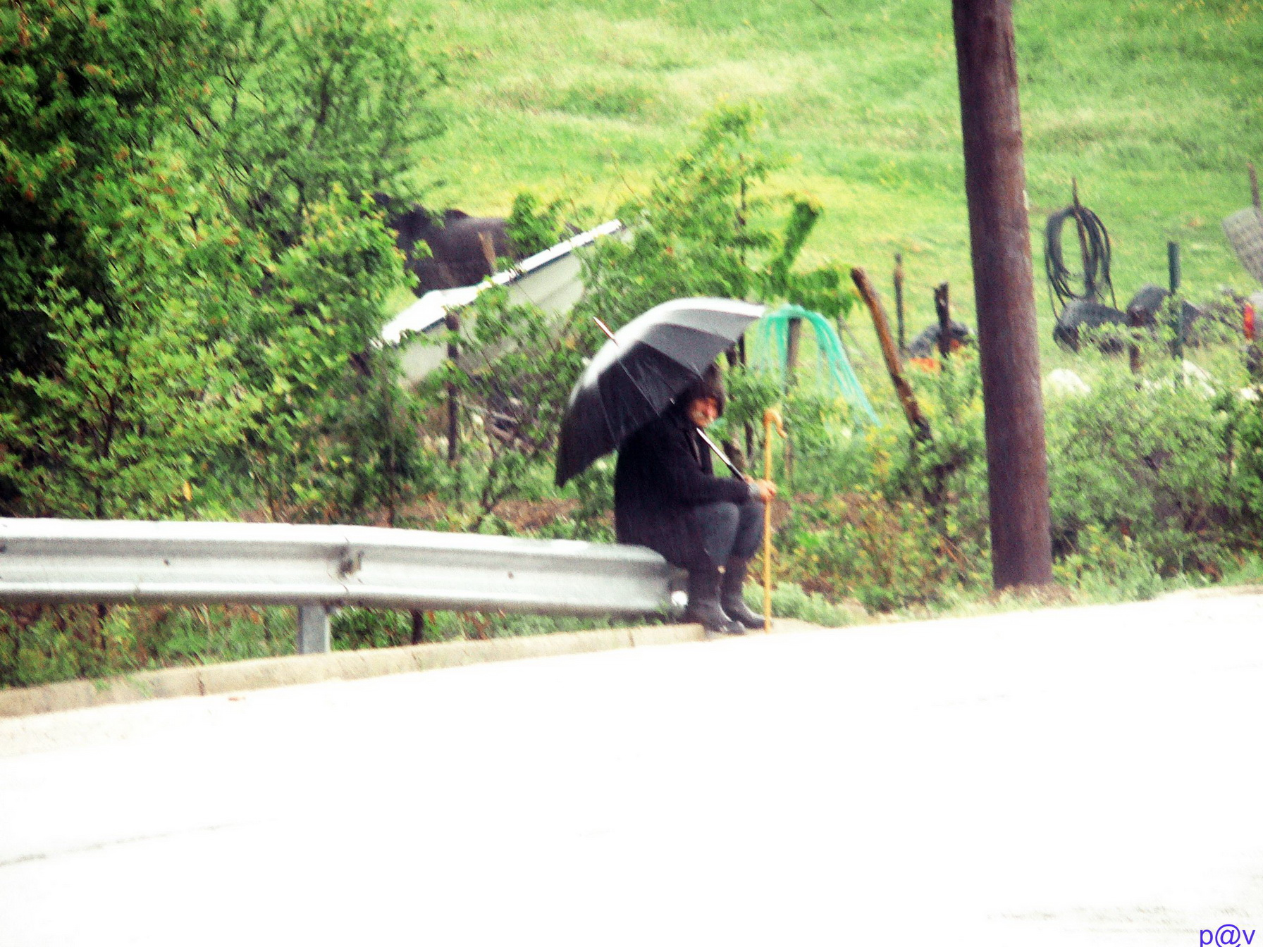 Βοσκος ξαποσταινει